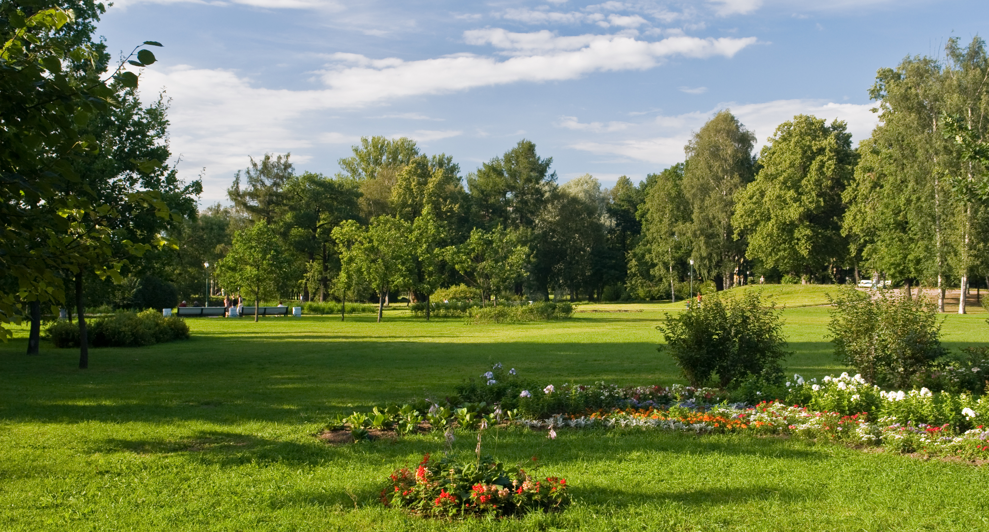 Лужайка в Таврическом саду (Санкт-Петербург, Россия)